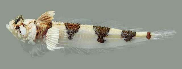 Gillellus uranidea range